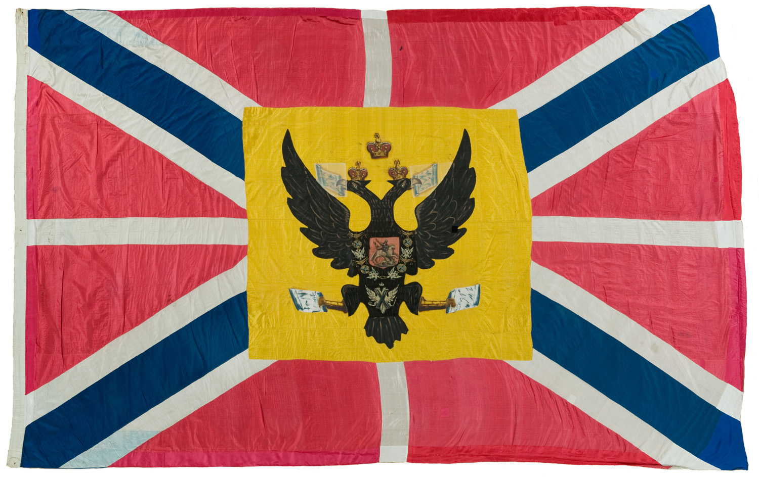 Flagga: Flaggan funnen ombord på VLADISLAFF, det ryska skepp, som erövrades i slaget vid Hogland 17 juli 1788.